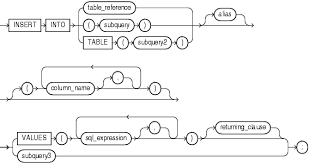 Монгол: Зураг2: INSERT статемент